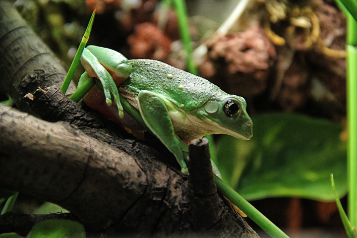 rana mexicana Agalychnis Dacnicolor o rana cara de niño